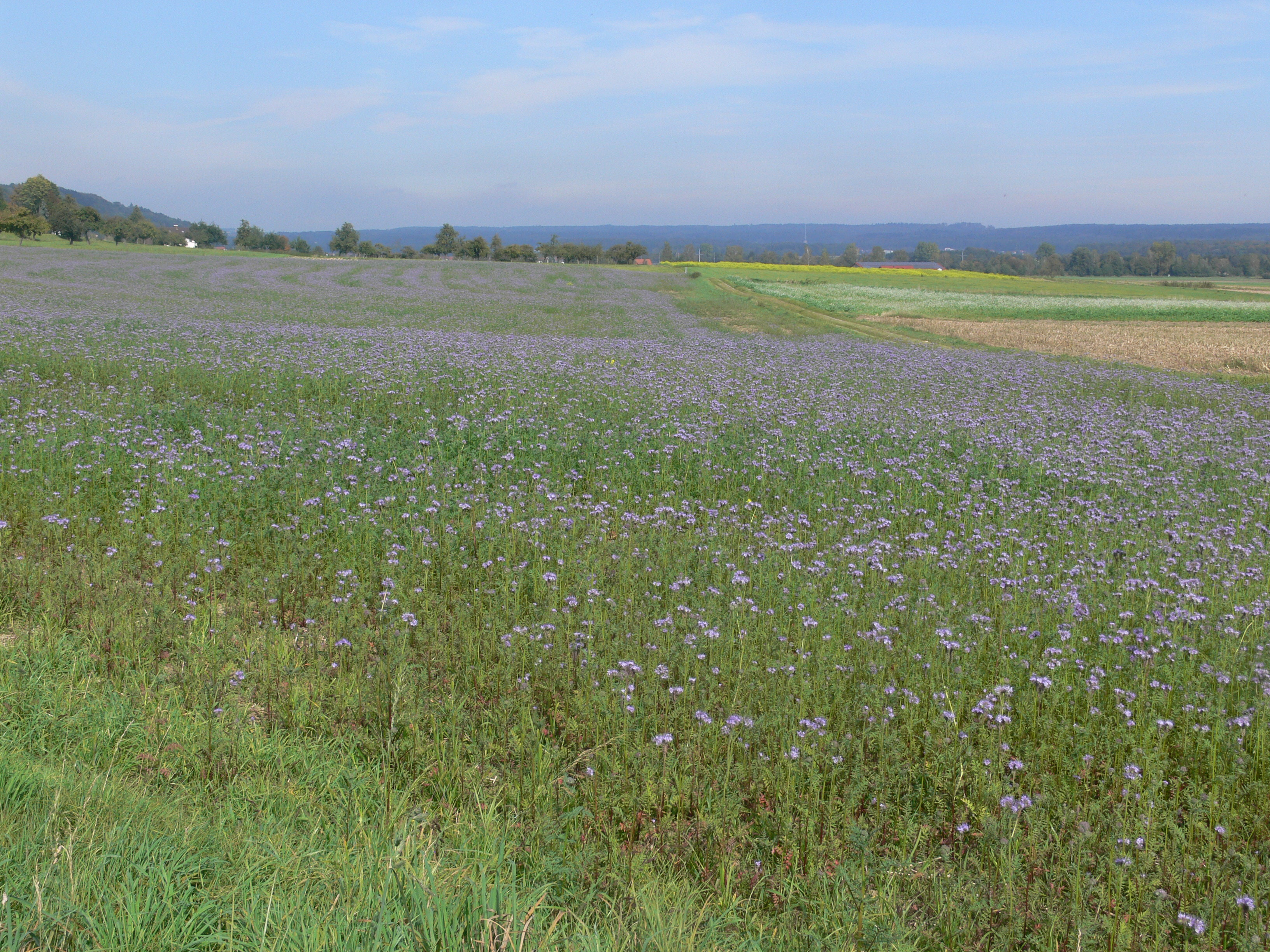 Ein Feld mit Phacelia tanacetifolia als Zwischenfrucht, Ettishofen, 88276 Berg (Schussental)